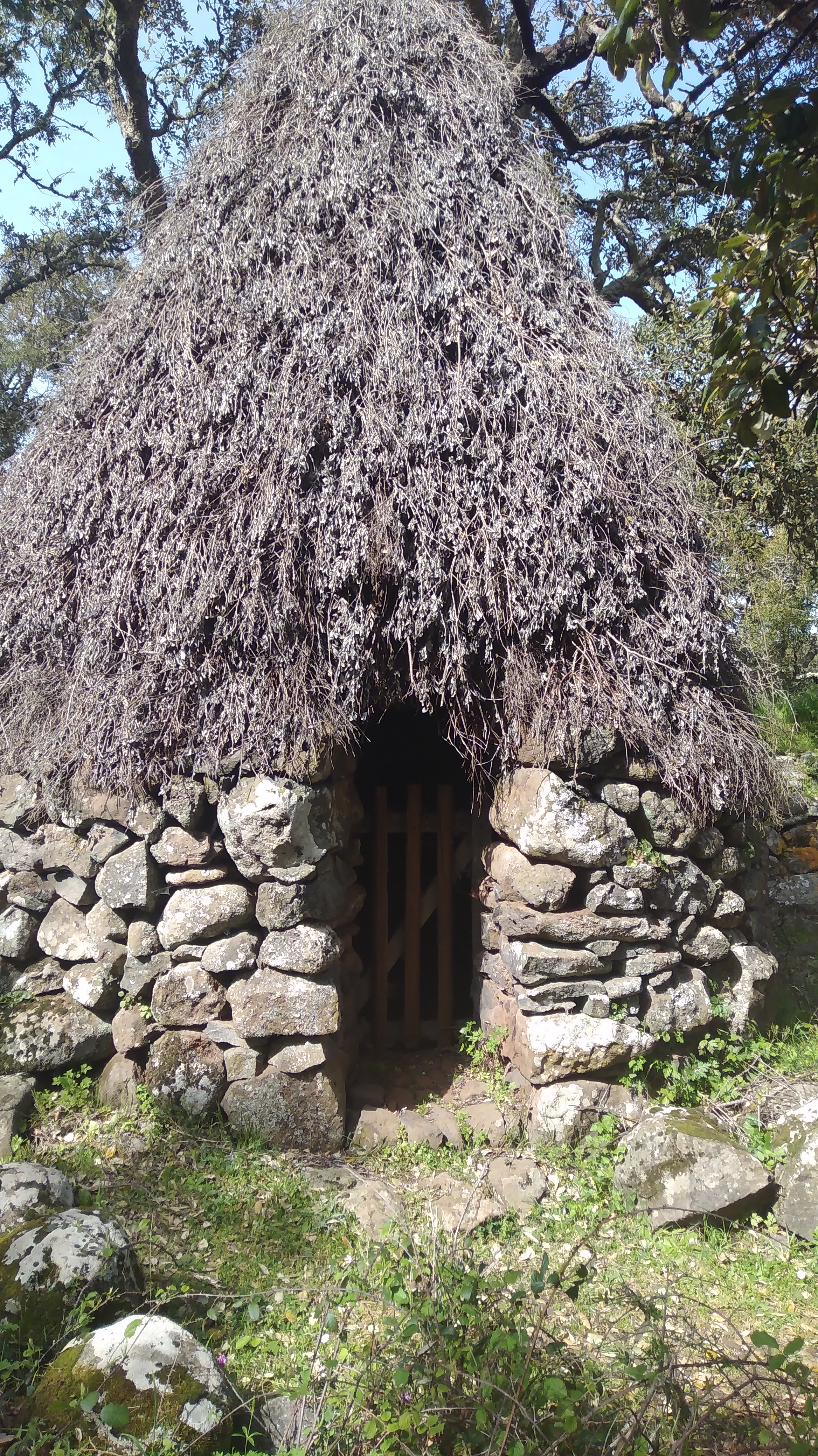 Giara di Gesturi (Q55262400)